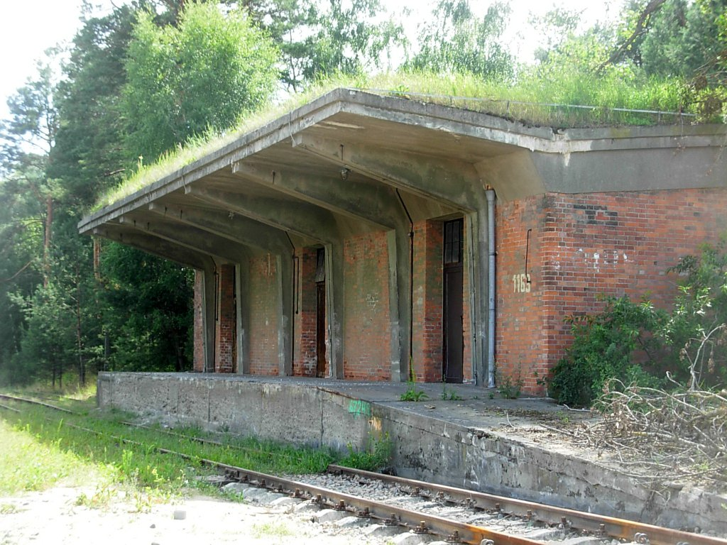 Rampy kolejowe pozostałe po DAG Fabrik Bromberg